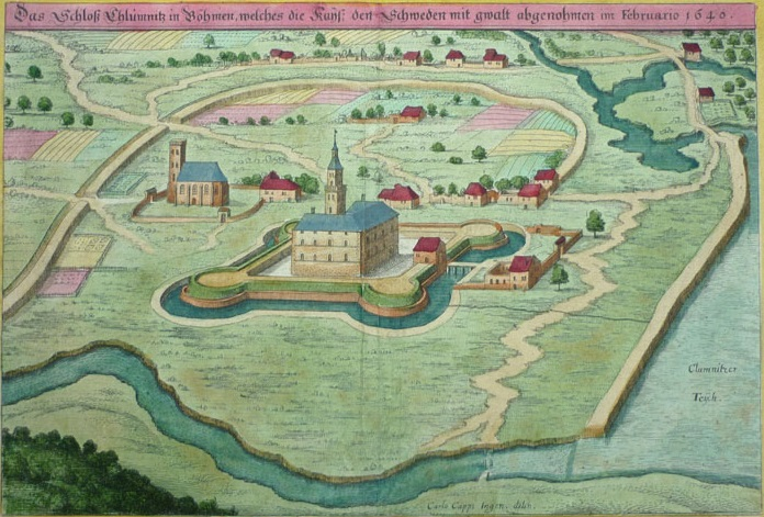 Veduta Chlumce nad Cidlinou z roku 1640